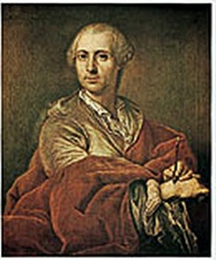 Franz Anton Leitenstorffer (1721-1795), Maler und Radierer aus Reutte in Tirol, der vorwiegend in der Kurpfalz arbeitete